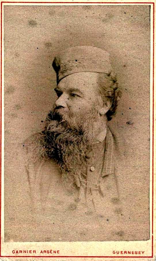 Portrait d'Arsène Garnier - Format caret-de-visite